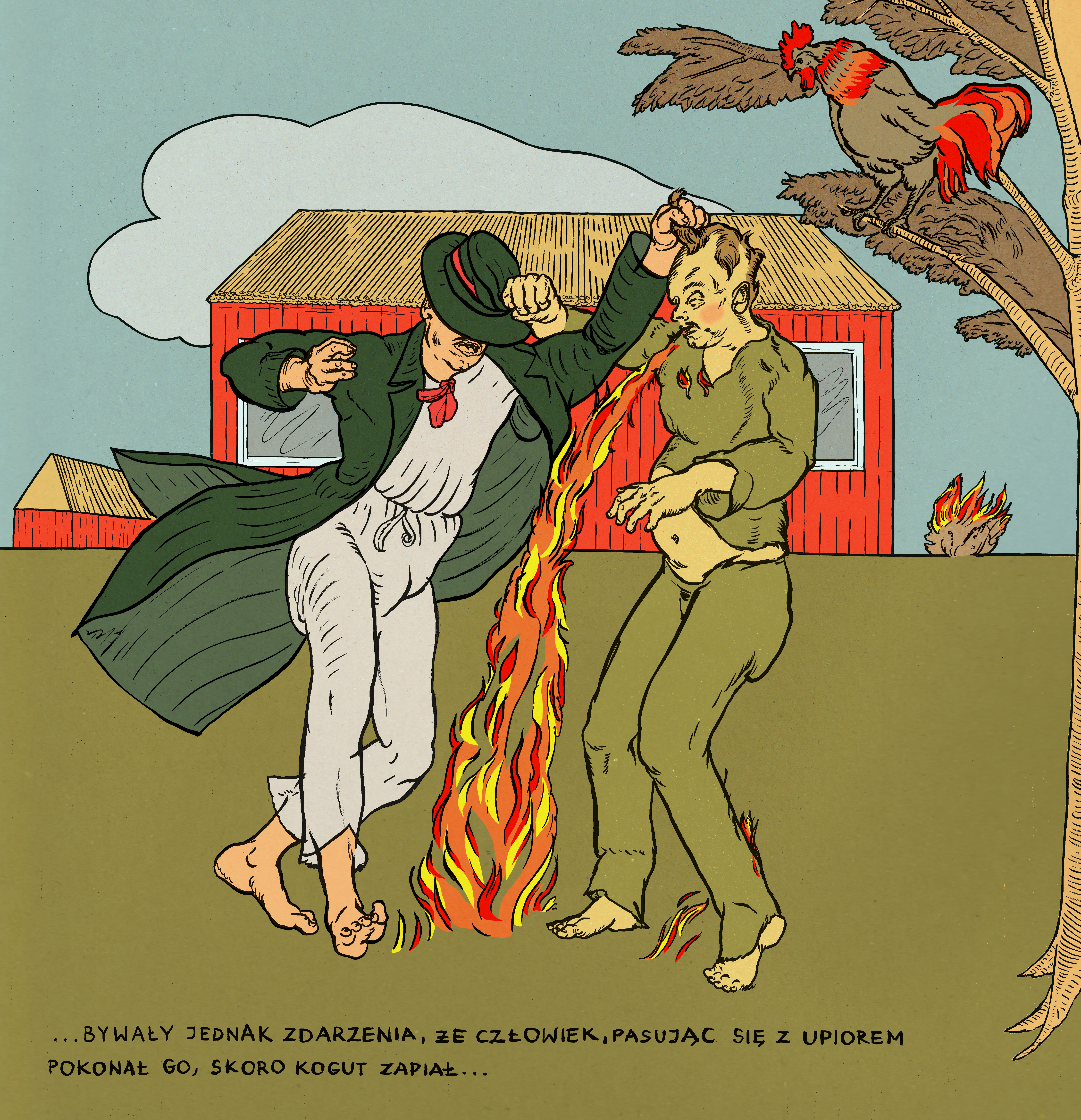 Grafika Macieja Sieńczyka do tekstu Oskara Kolberga na temat fizycznej konfrontacji polskich chłopów z upiorami (Lubelskie, Cz. 2)